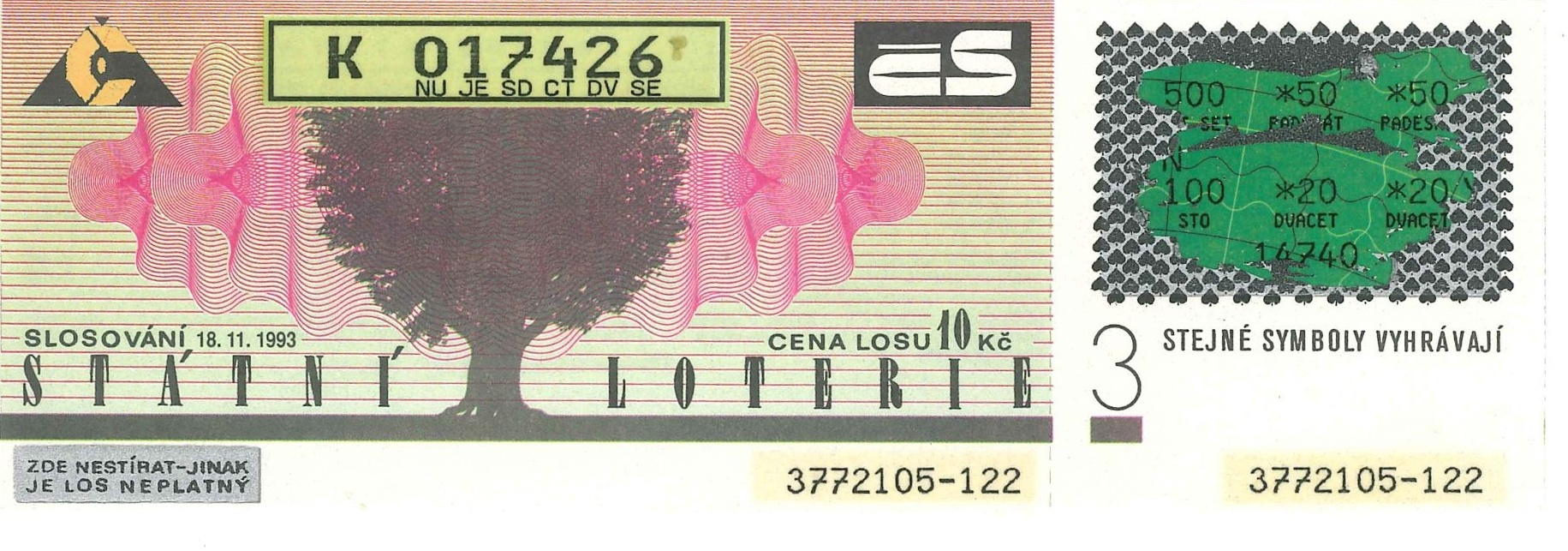 vývoj losů